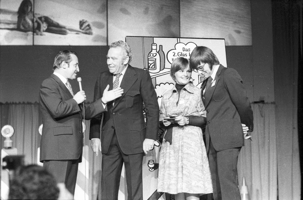 Abschlussfeier in der Ostseehalle. Übergabe des "Großen Preis des Abends" an das Ehepaar Marlies und Franz Walkowiak aus Lambertheim durch den Staatssekretär Ernst Haar (1.v.l.) und den Showmaster Peter Frankenfeld (2.v.l.).